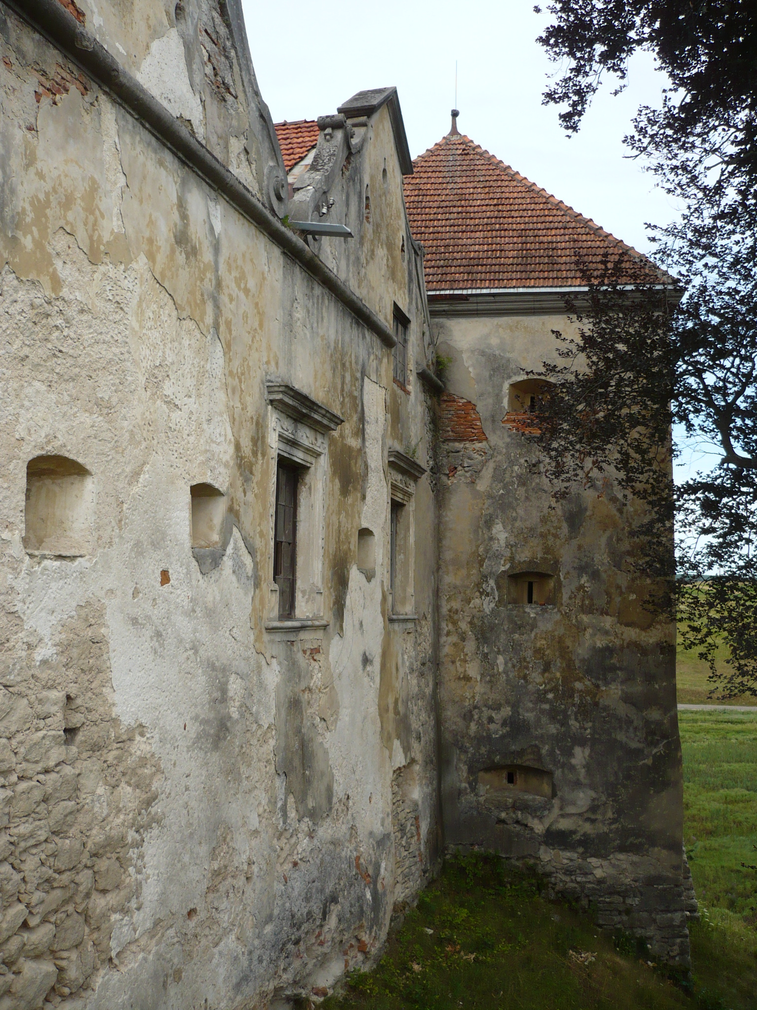 Ściana frontowa zamku w Świrzu na Ukrainie. Zamek stanowił pierwotnie własność książąt Świrskich, od XVII wieku należał do rodu Cetnerów, zniszczony podczas wojen kozackich w 1648, zdobyty przez Turków w 1672. Po pierwszym rozbiorze Rzeczypospolitej znalazł się na obszarze zaboru austriackiego. Ostatnimi właścicielami przed 1939 byli Irena z Lamezanów i jej mąż Tadeusz Komorowski, późniejszy dowódca Armii Krajowej i powstania warszawskiego